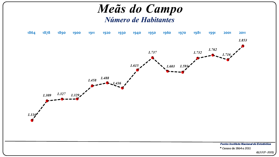 População